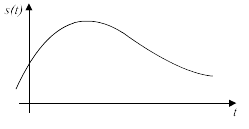 Imagen CFDL tomada y editada a partir de